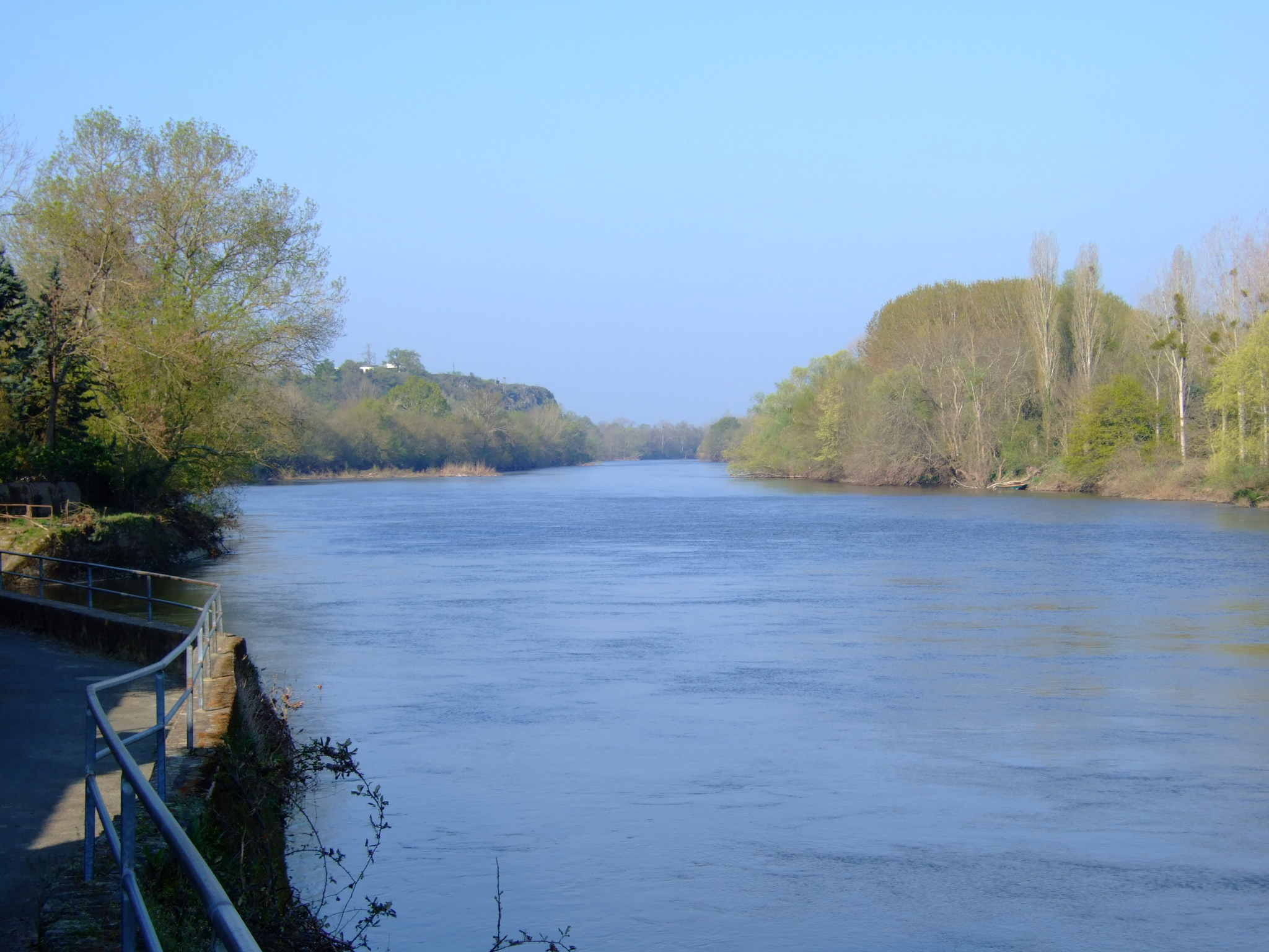 Le Louet à Érigné